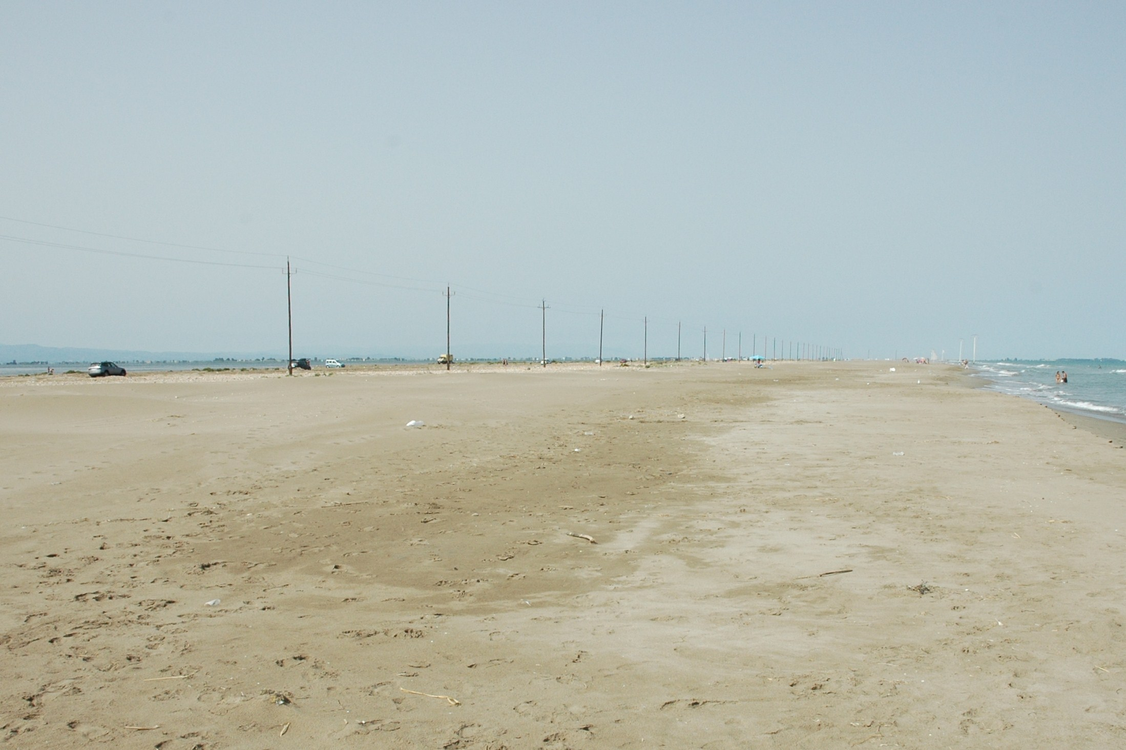 Delta de l'Ebre-Istme del Trabucador